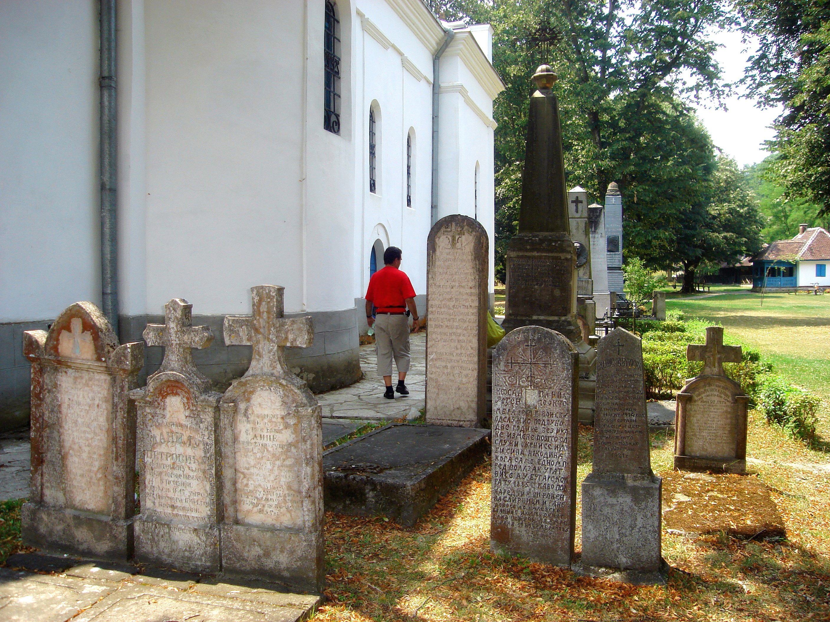 Надгробни споменици у порти цркве у Бранковини,међу којима су и чланови породице Ненадовић и других виђенијих личности тога краја...